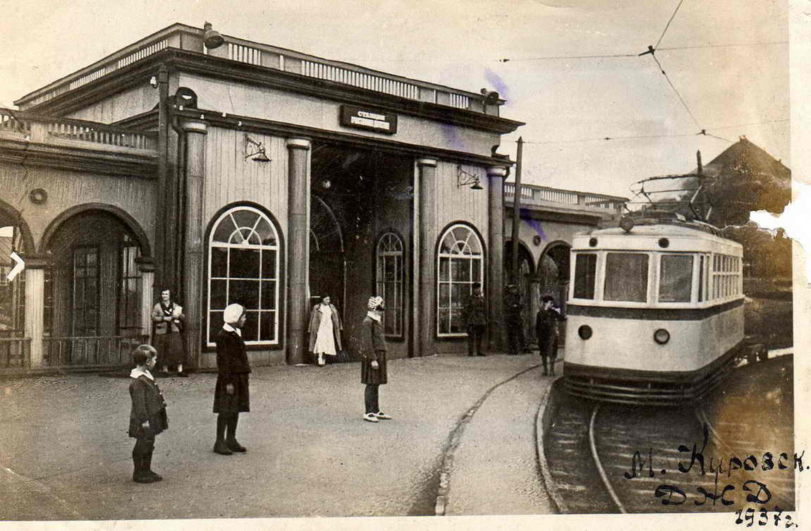 Одна из станций первой Донецкой детской железной дороги. Фото из газеты конца 1930-х годов.